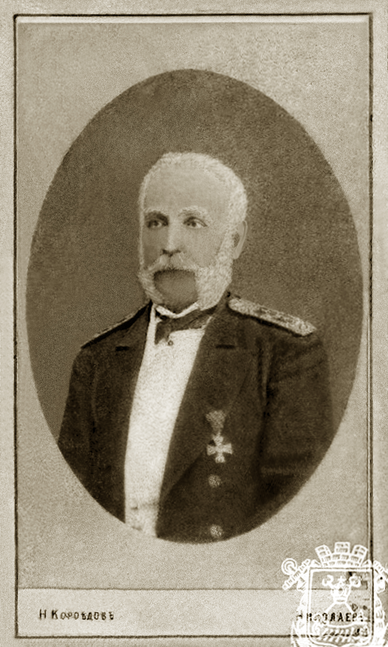 Адмирал Андрей Иванович Никонов